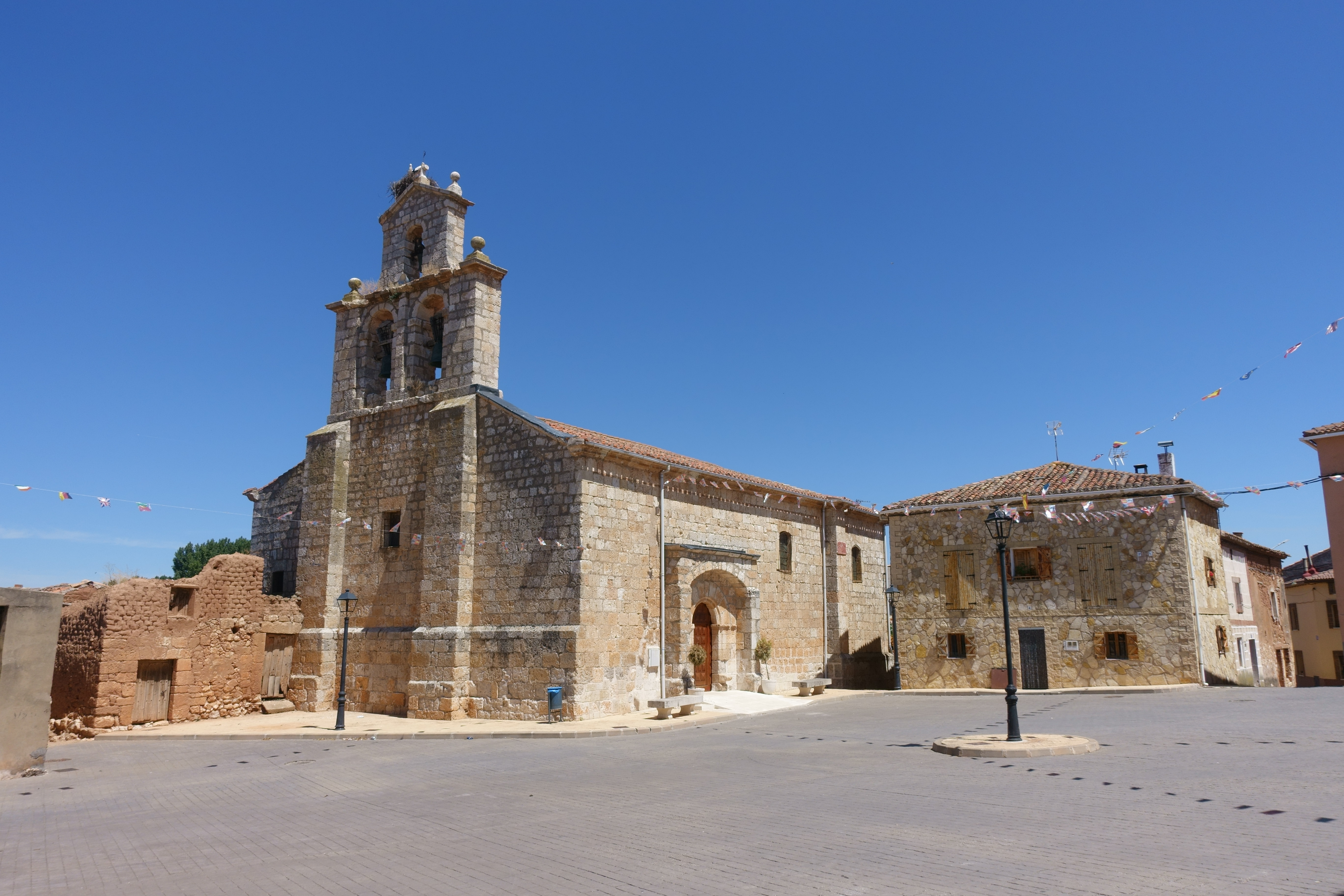 Iglesia de San Esteban Protomártir, en Torrepadre (Burgos, España).